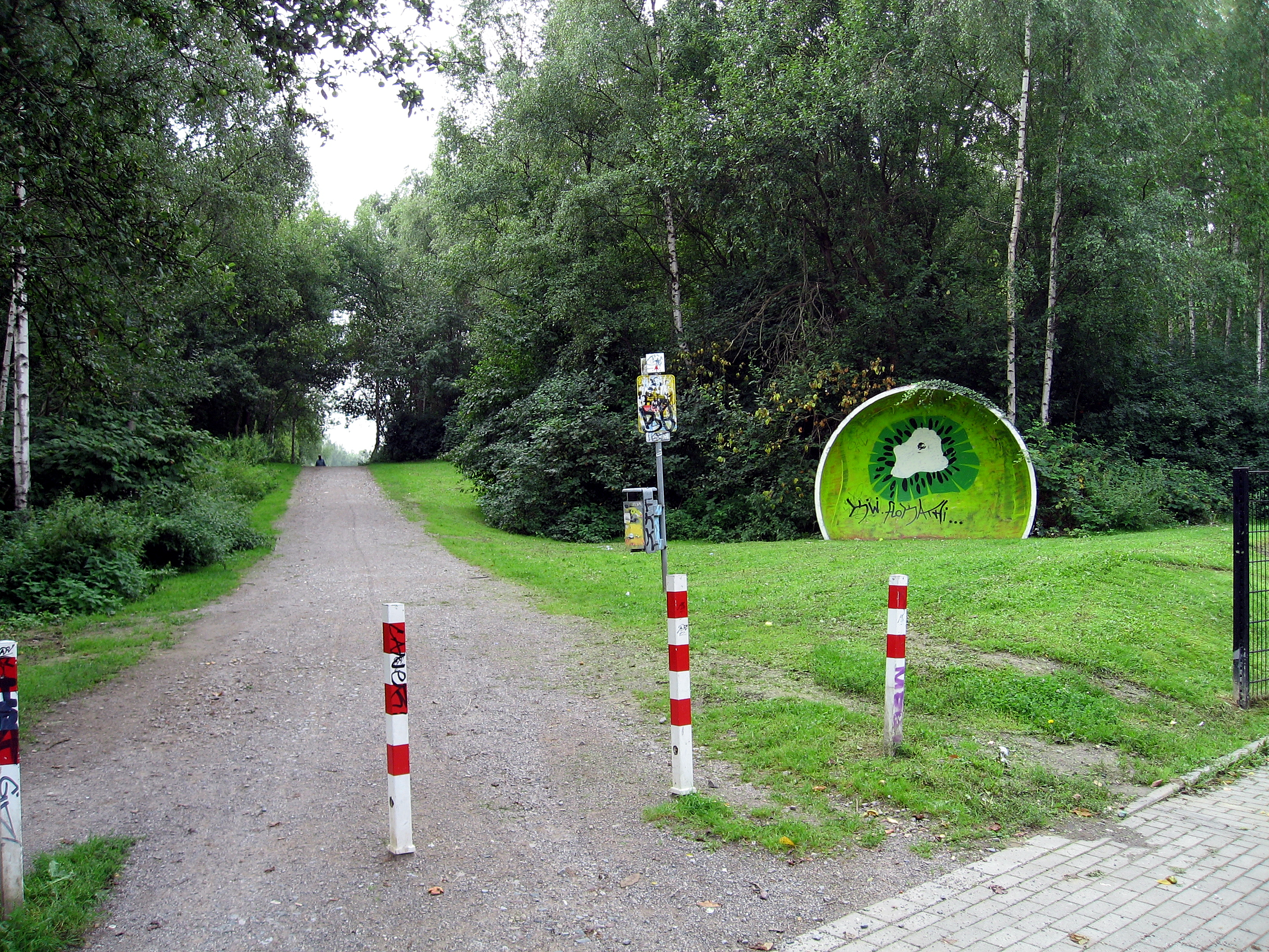 Dortmund-Tremonia-Park-Eingang